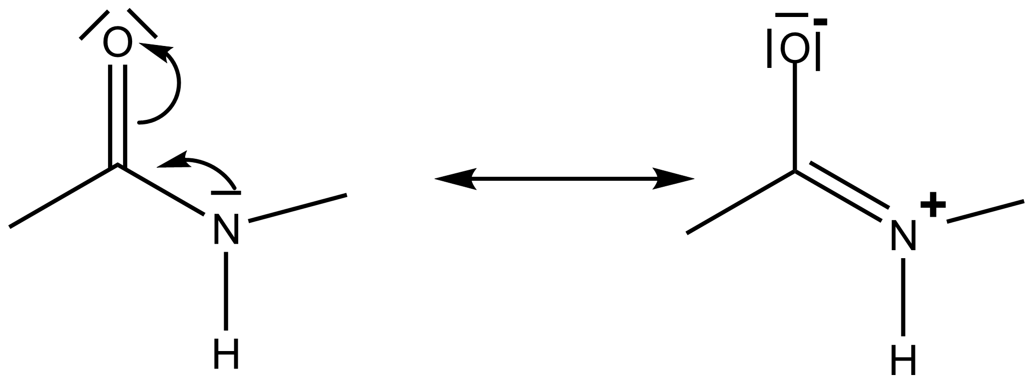 2 formes de résonance de la liaison peptidique